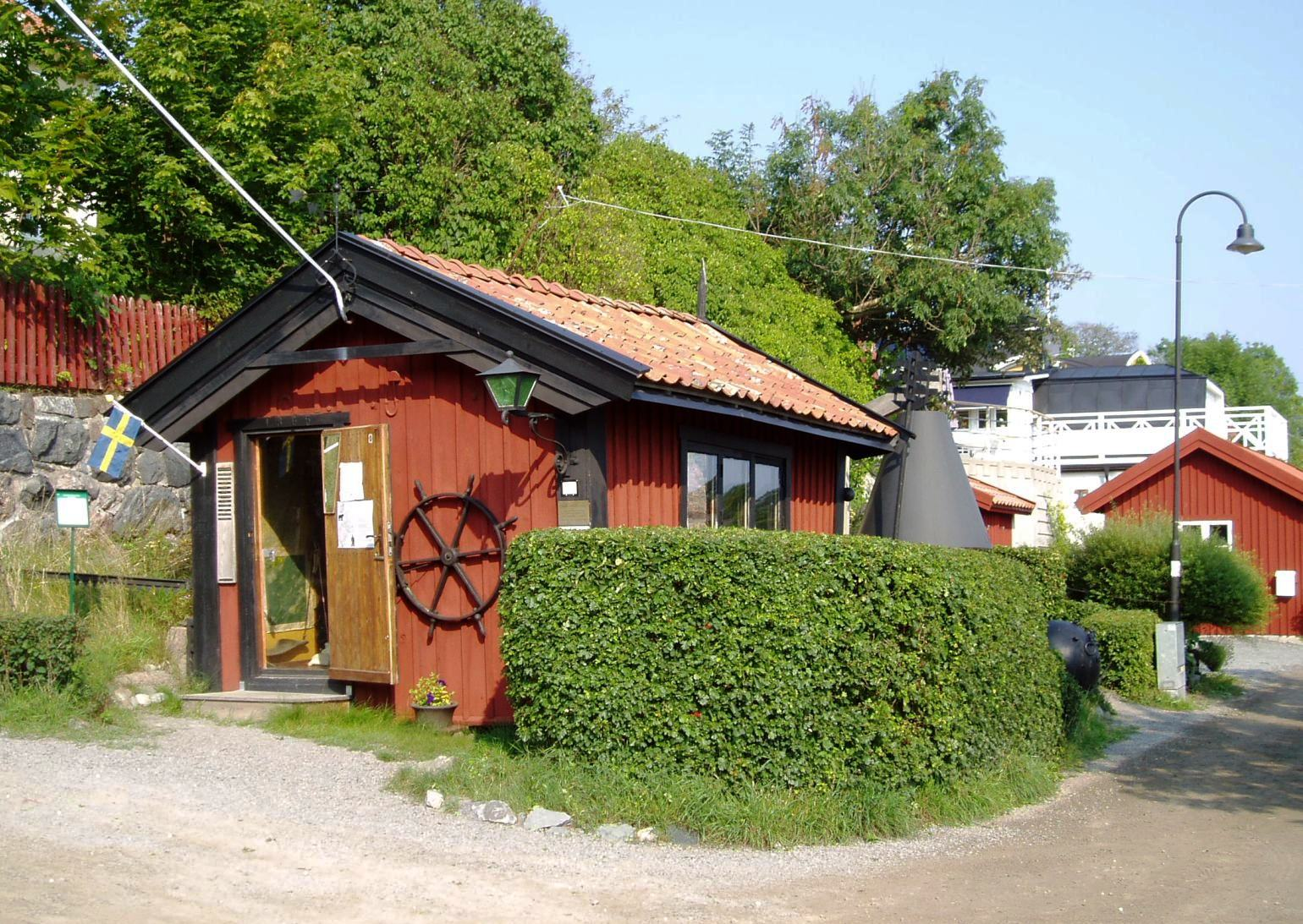 Anders Franzéns sjöbod, Dalarö, Haninge kommun, bakom huset rekonstruktion av en dykarklocka